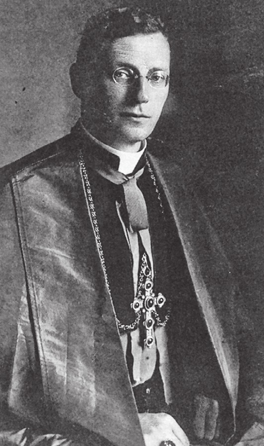 Luigi Fogàr, vescovo di Trieste e Capodistria dal 1923 al 1936.